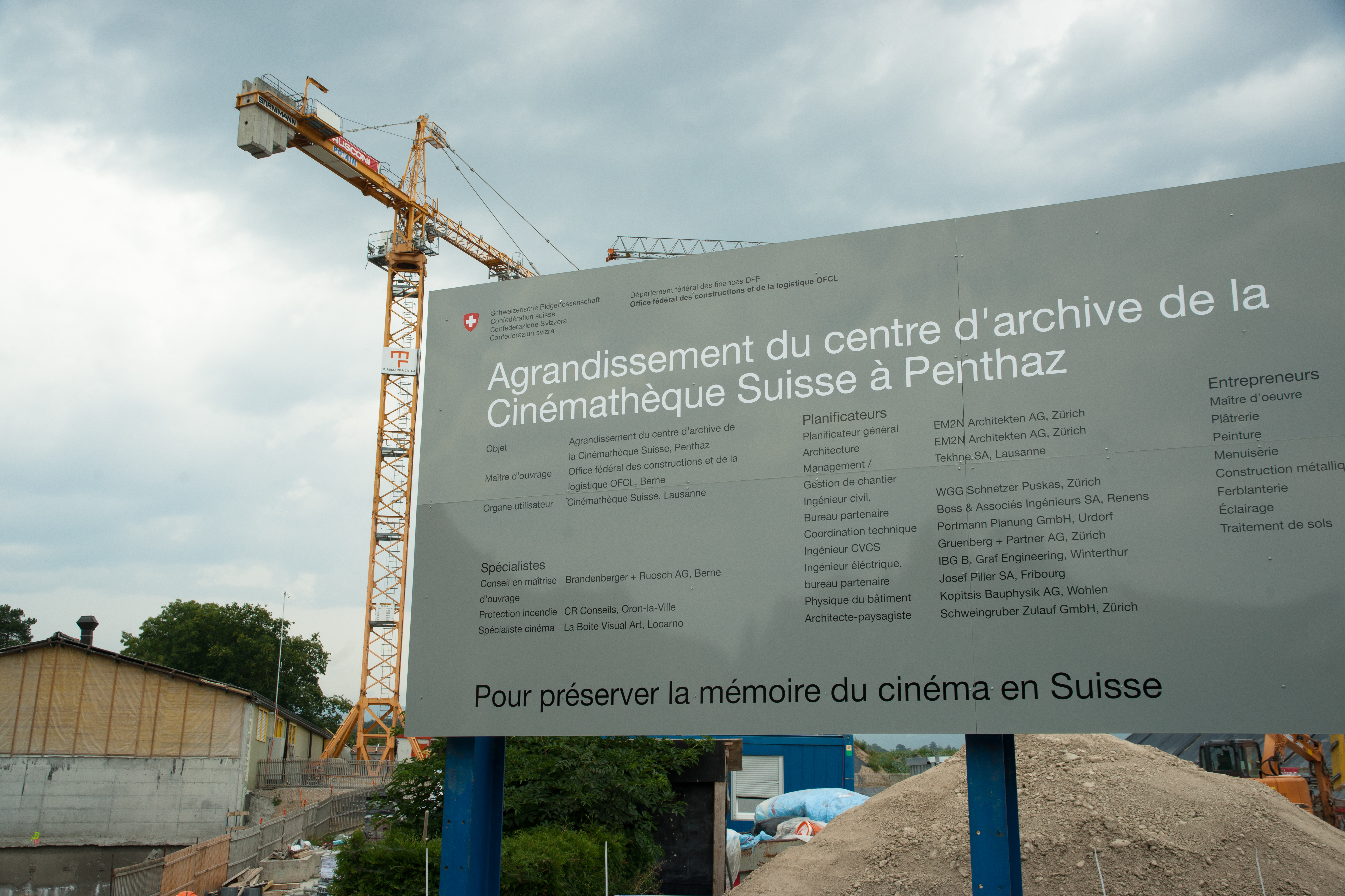 Travaux d'agrandissement de la cinémathèque suisse en 2011.